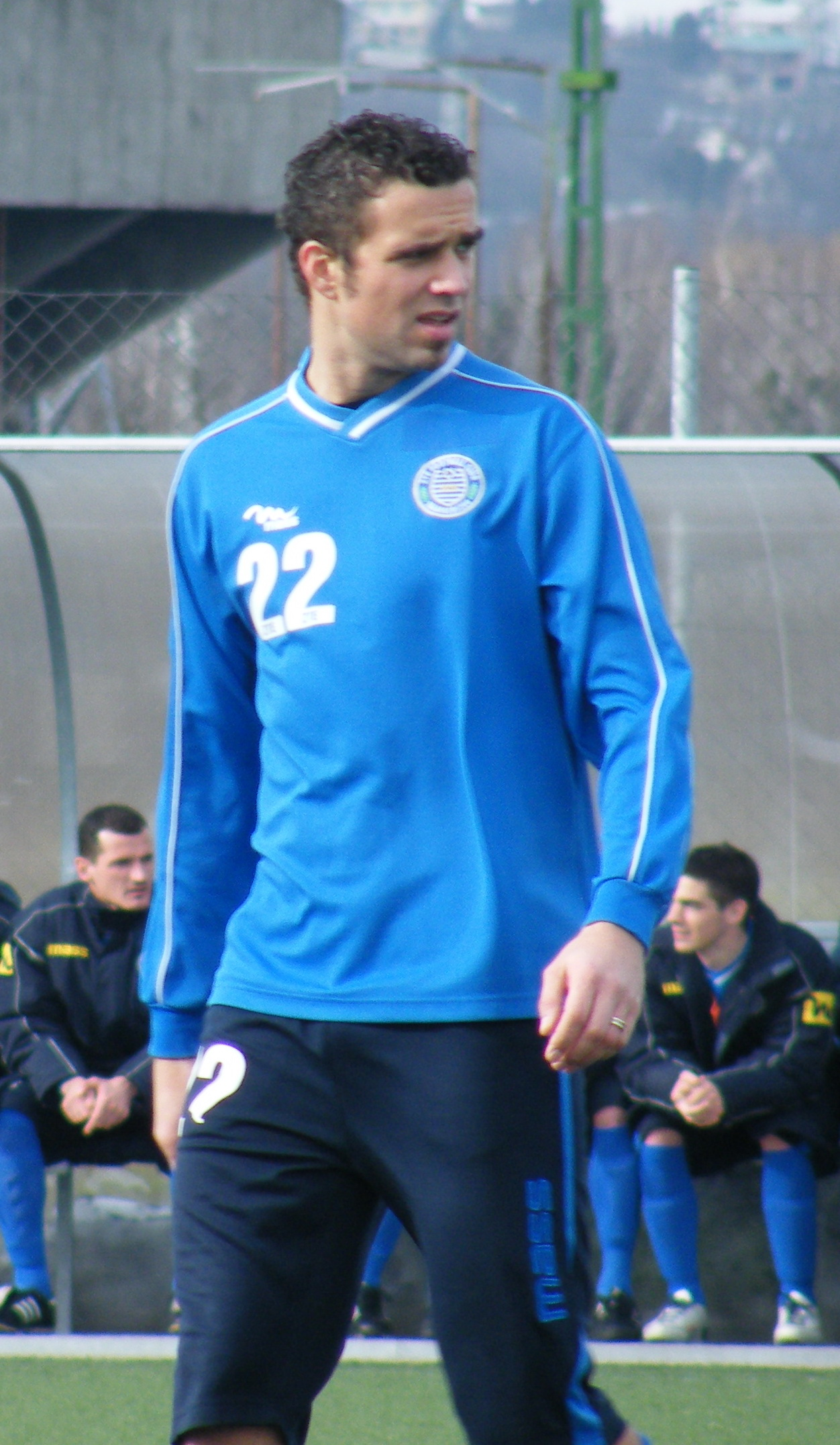 Matej Miljatovič Slovenian association football player.